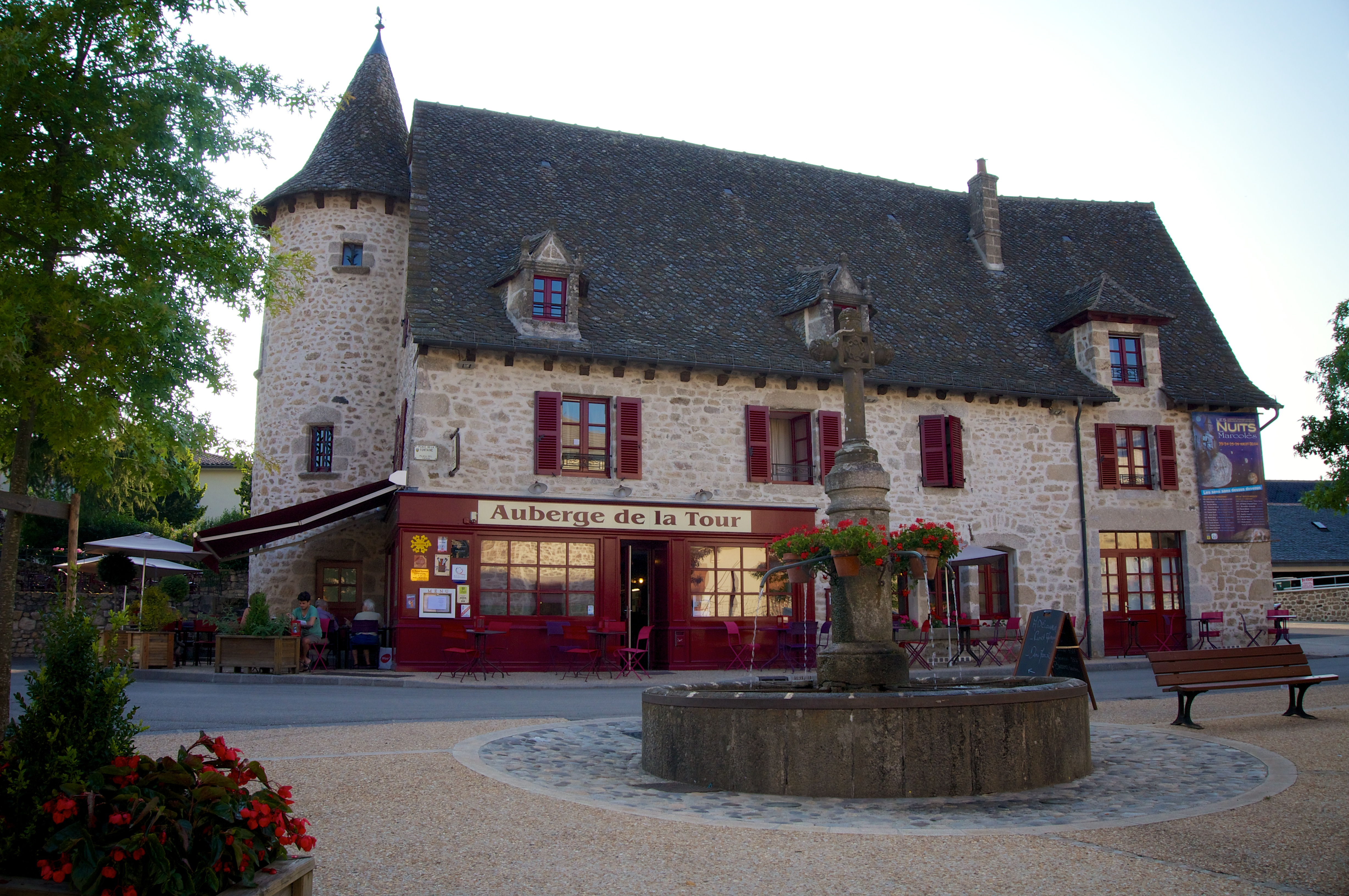 Auberge de la Tour, place du village - Marcolès